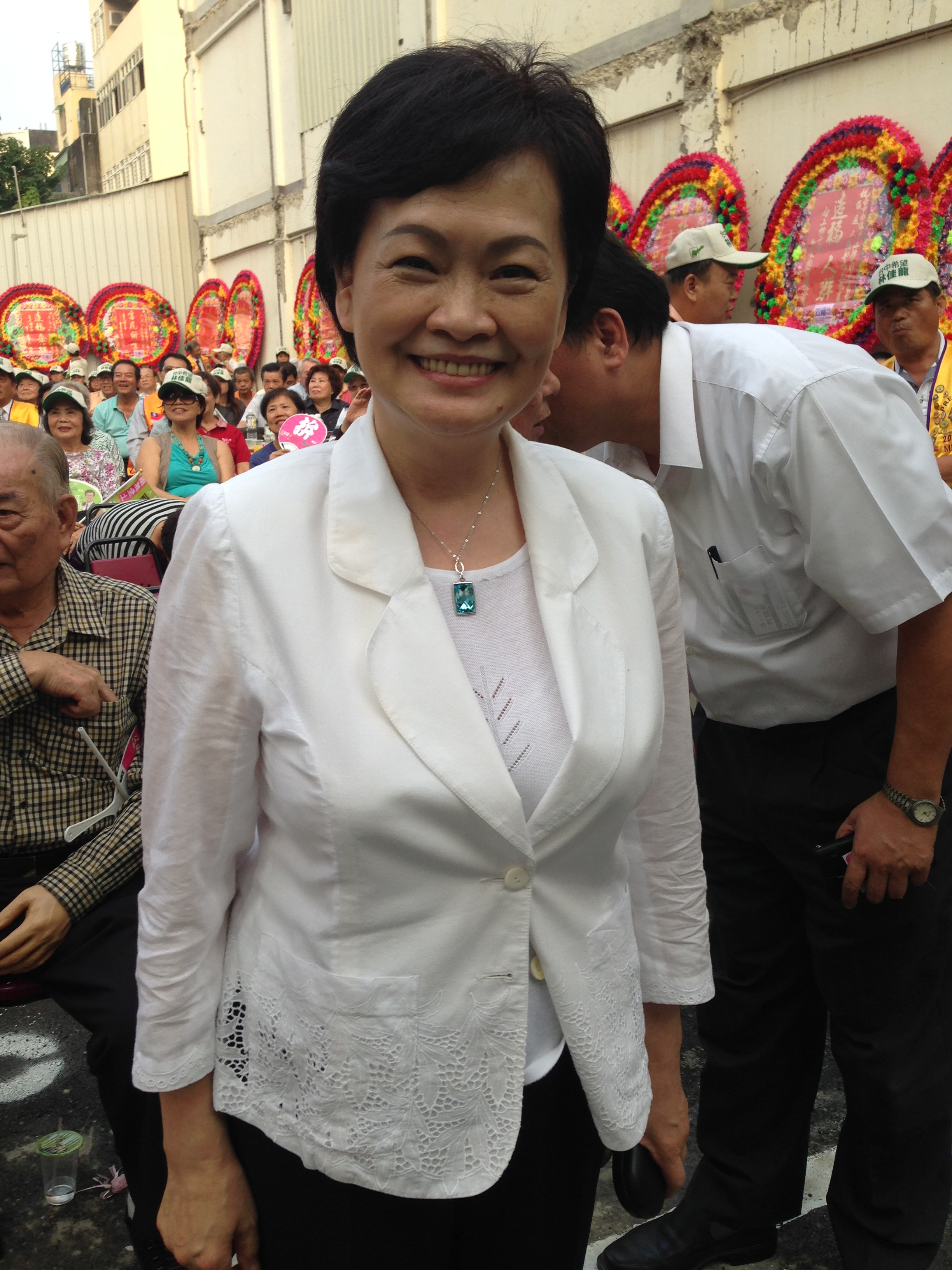 中文（台灣）: 張溫鷹。